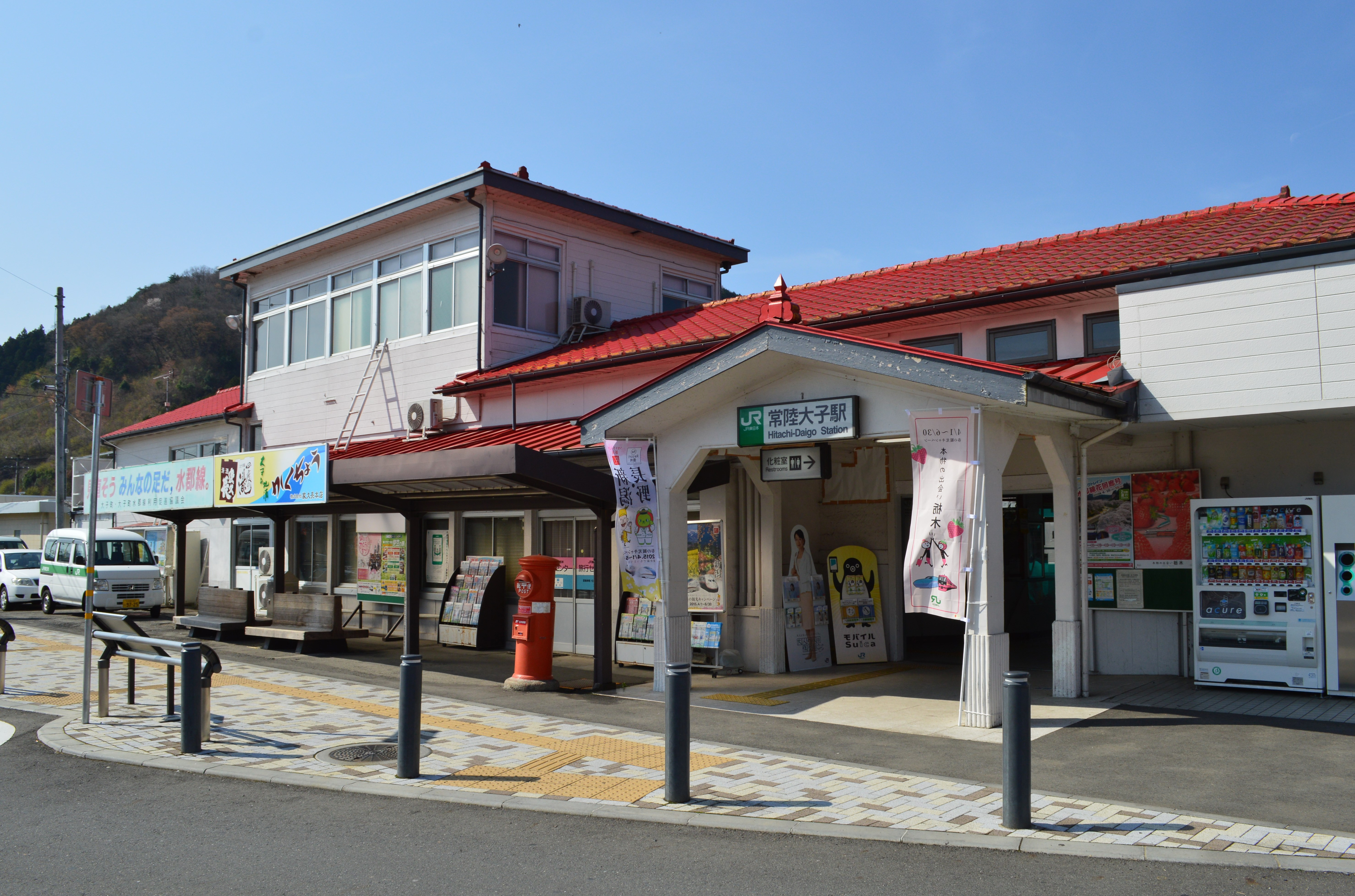 常陸大子駅 駅舎